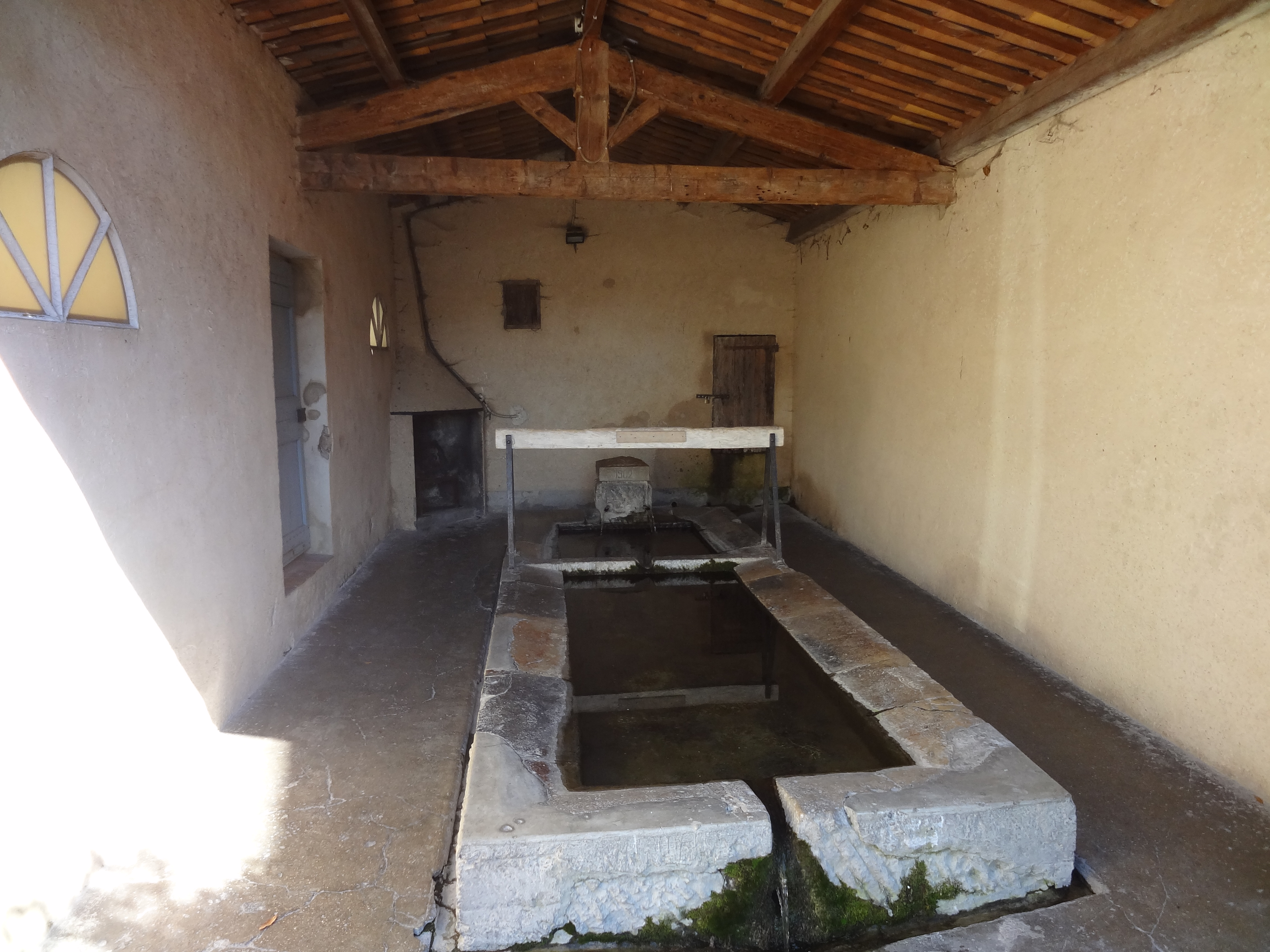 Le lavoir comporte les principaux perfectionnements : cheminée pour chauffer l’eau (au fond à gauche) ; deux bassins pour laver et rincer le linge ; poutre pour poser le linge lavé ; rigole pour récupérer l’eau autour du bassin. Enfin le lavoir n’est ouvert que du côté où le lavoir peut recevoir le soleil (à l’ouest).